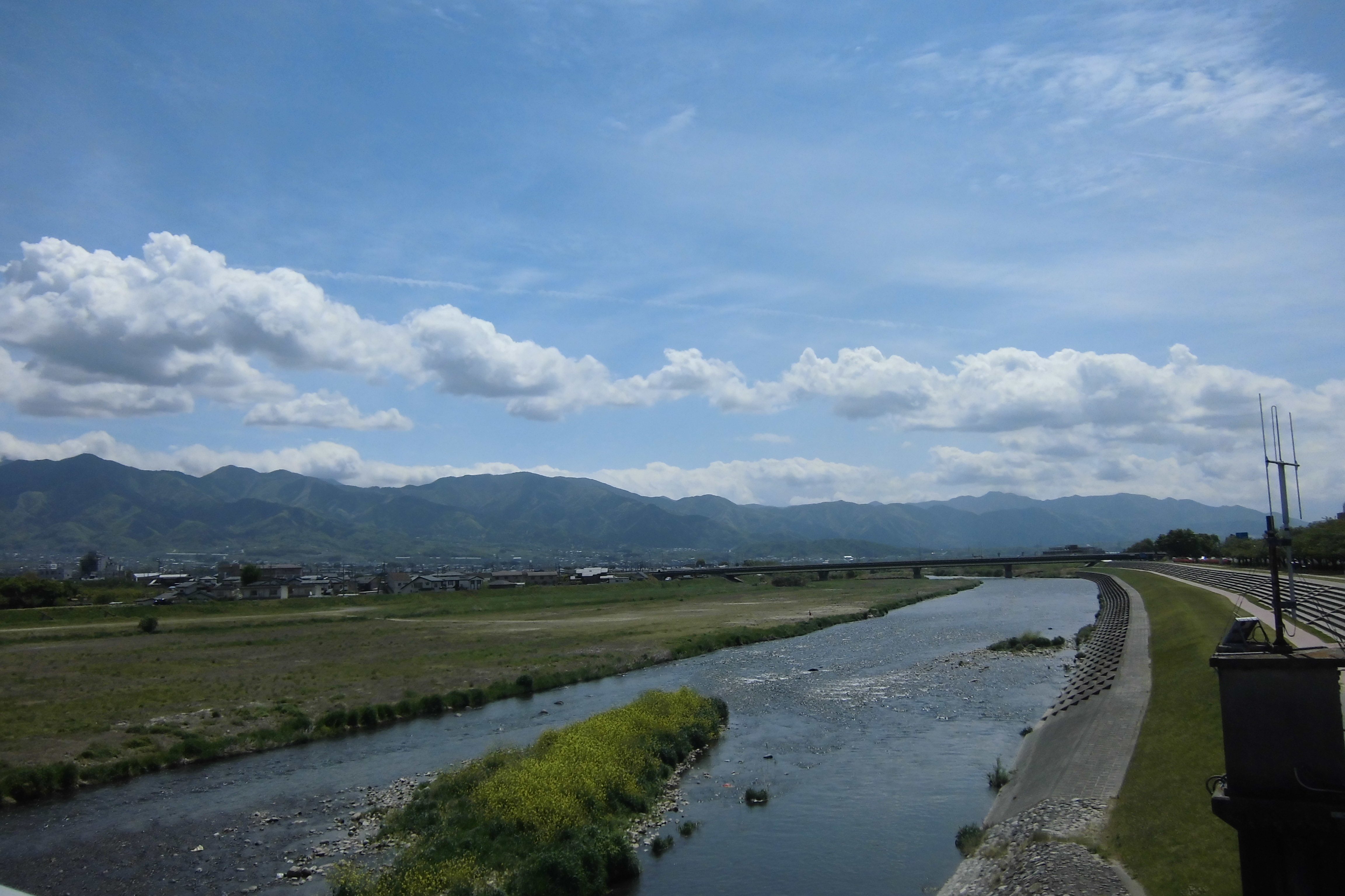 笛吹川（山梨県笛吹市・鵜飼橋から南側）